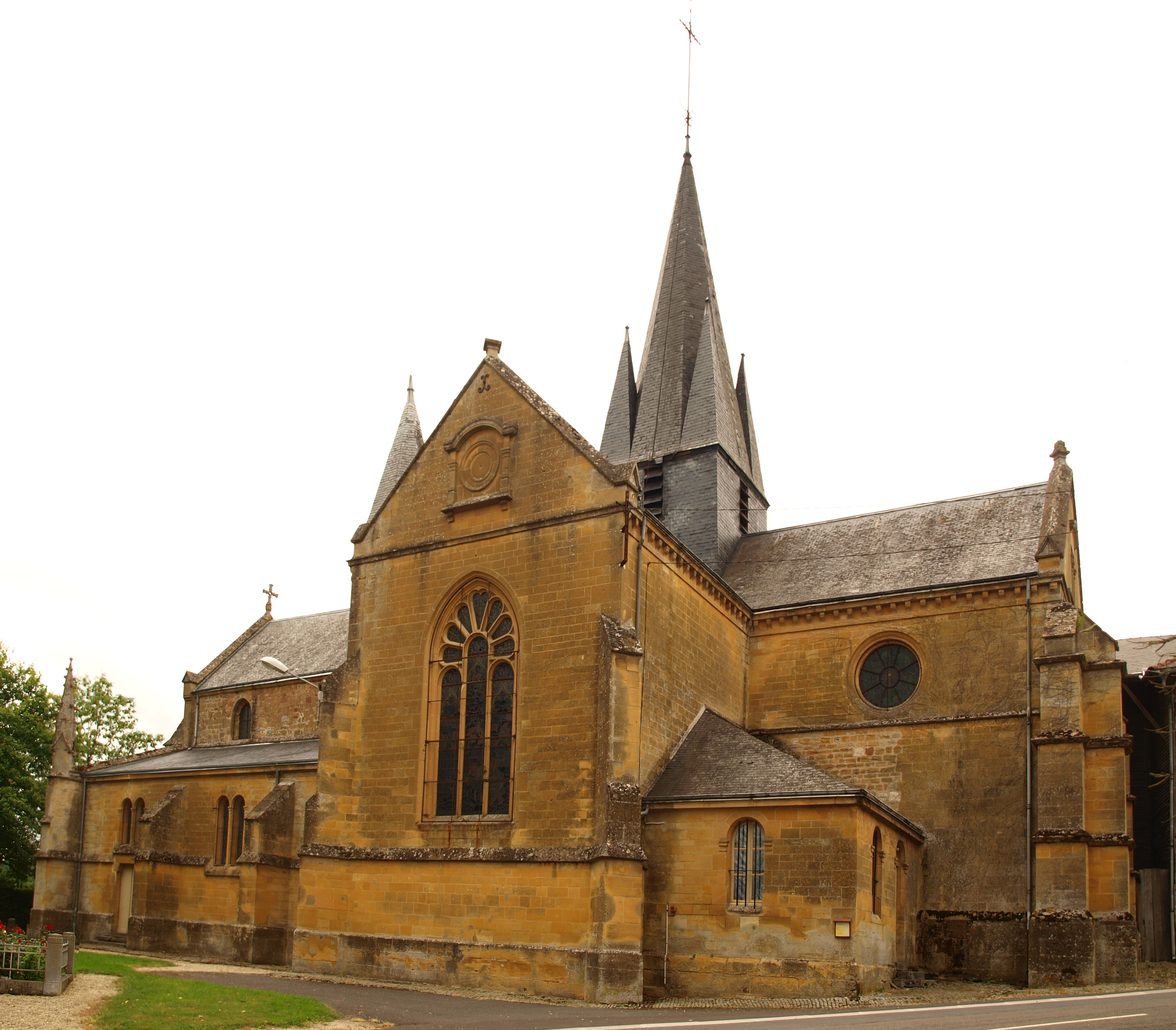 Senuc (Ardennes, France) ; église Saint-Oricle